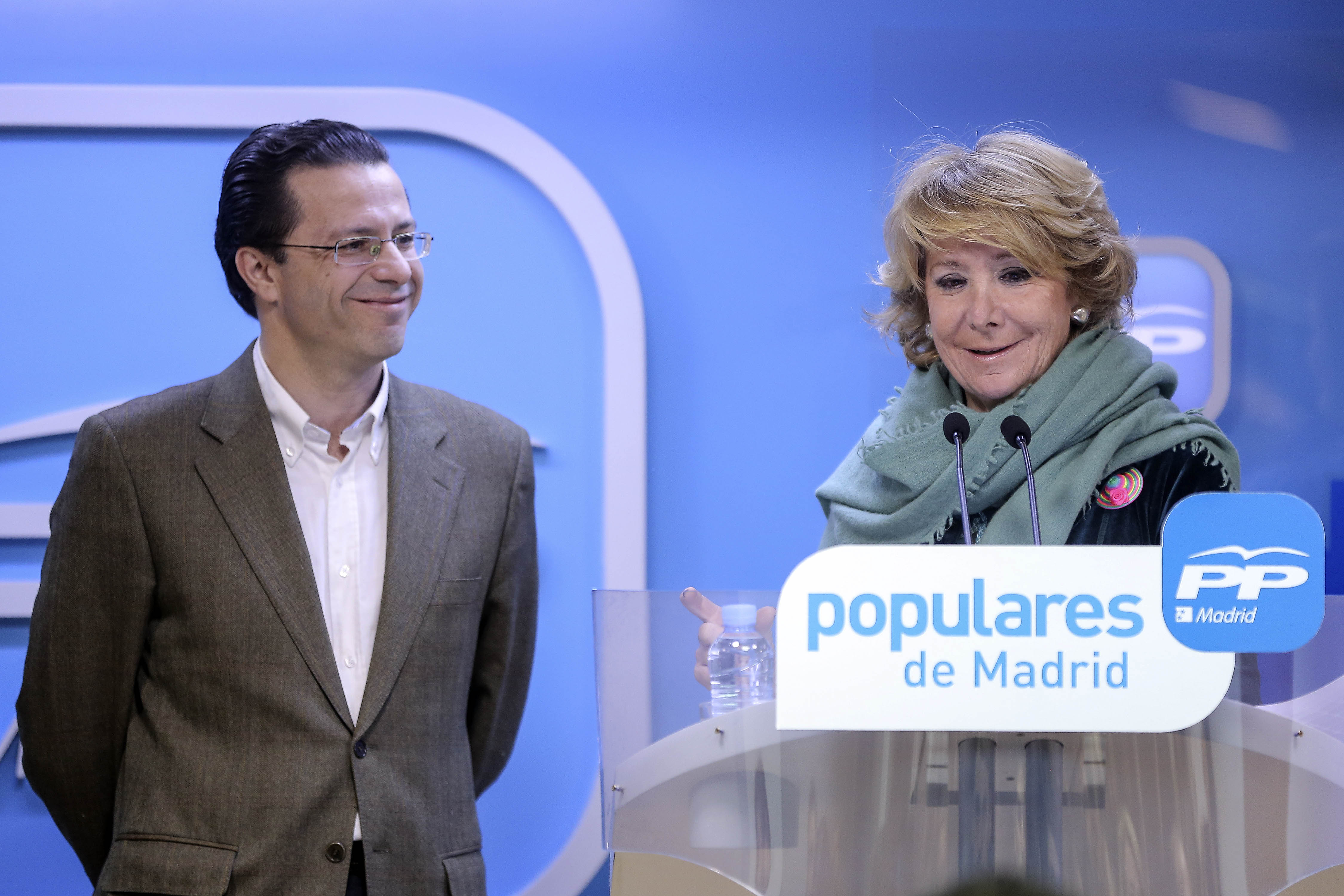 Fotos Comité